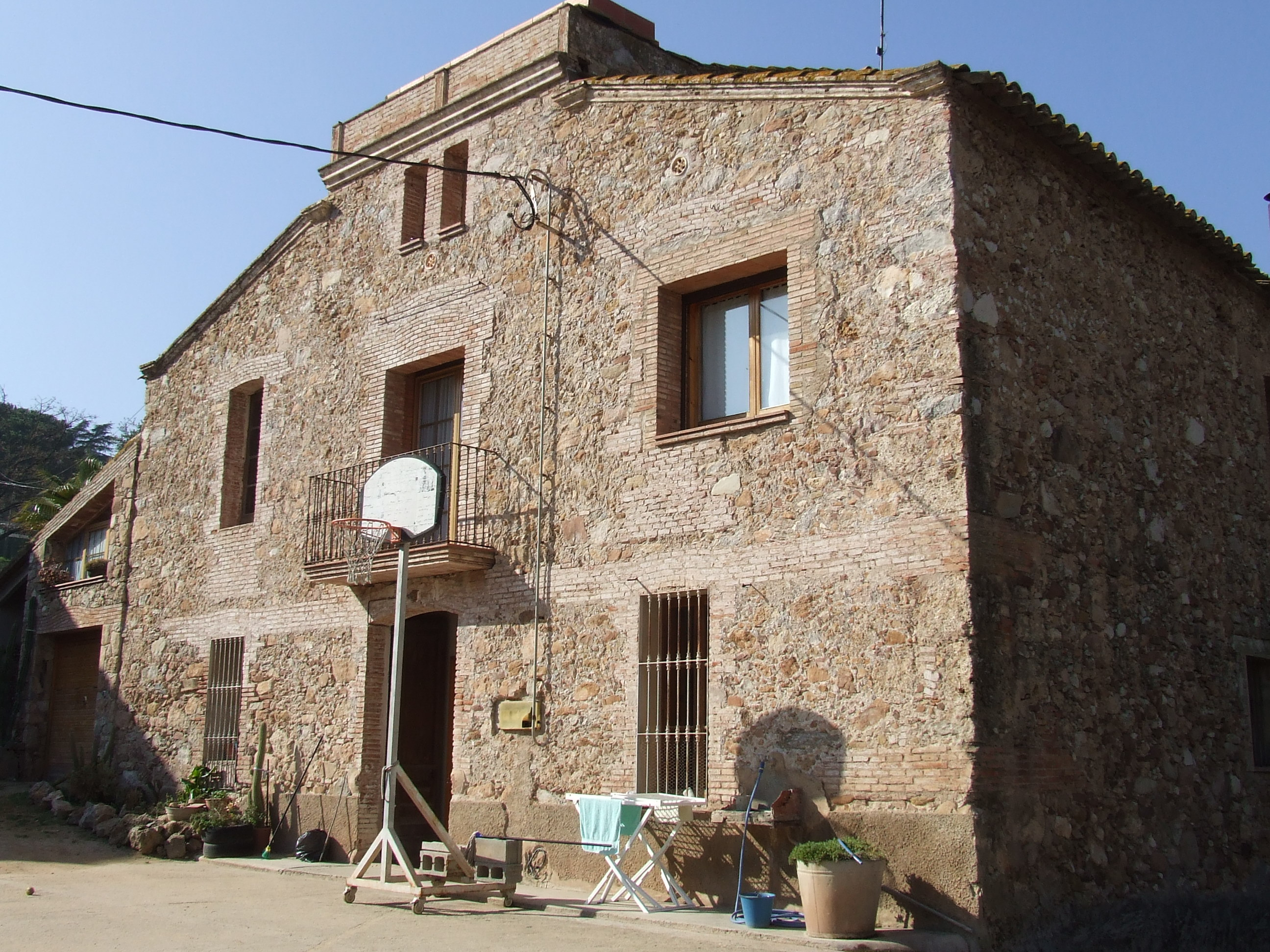 Can Domènec (Bigues, Bigues i Riells, Vallès Oriental)